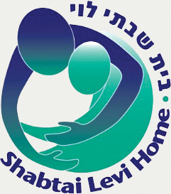 לוגו העמותה